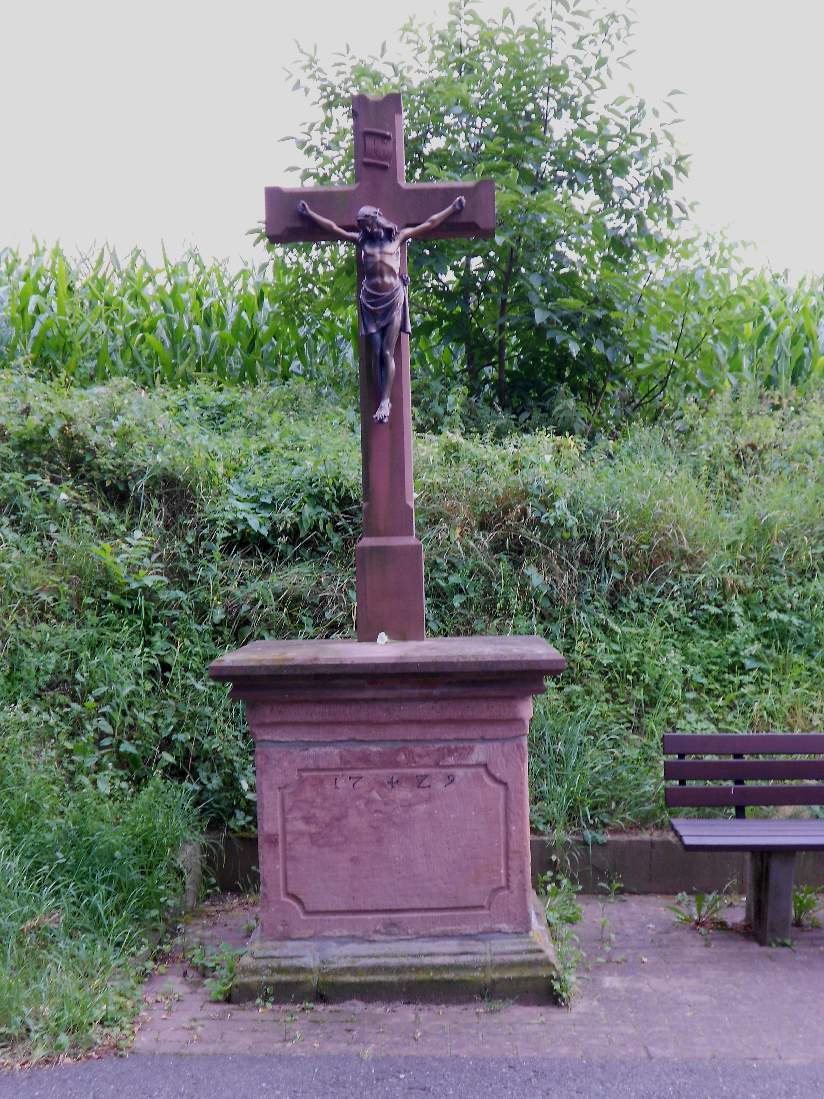 Steinkreuz (Ruhkreuz), 1729.Odenwaldstraße 27, Wörth am Main, AktenNr. D-6-76-169-20